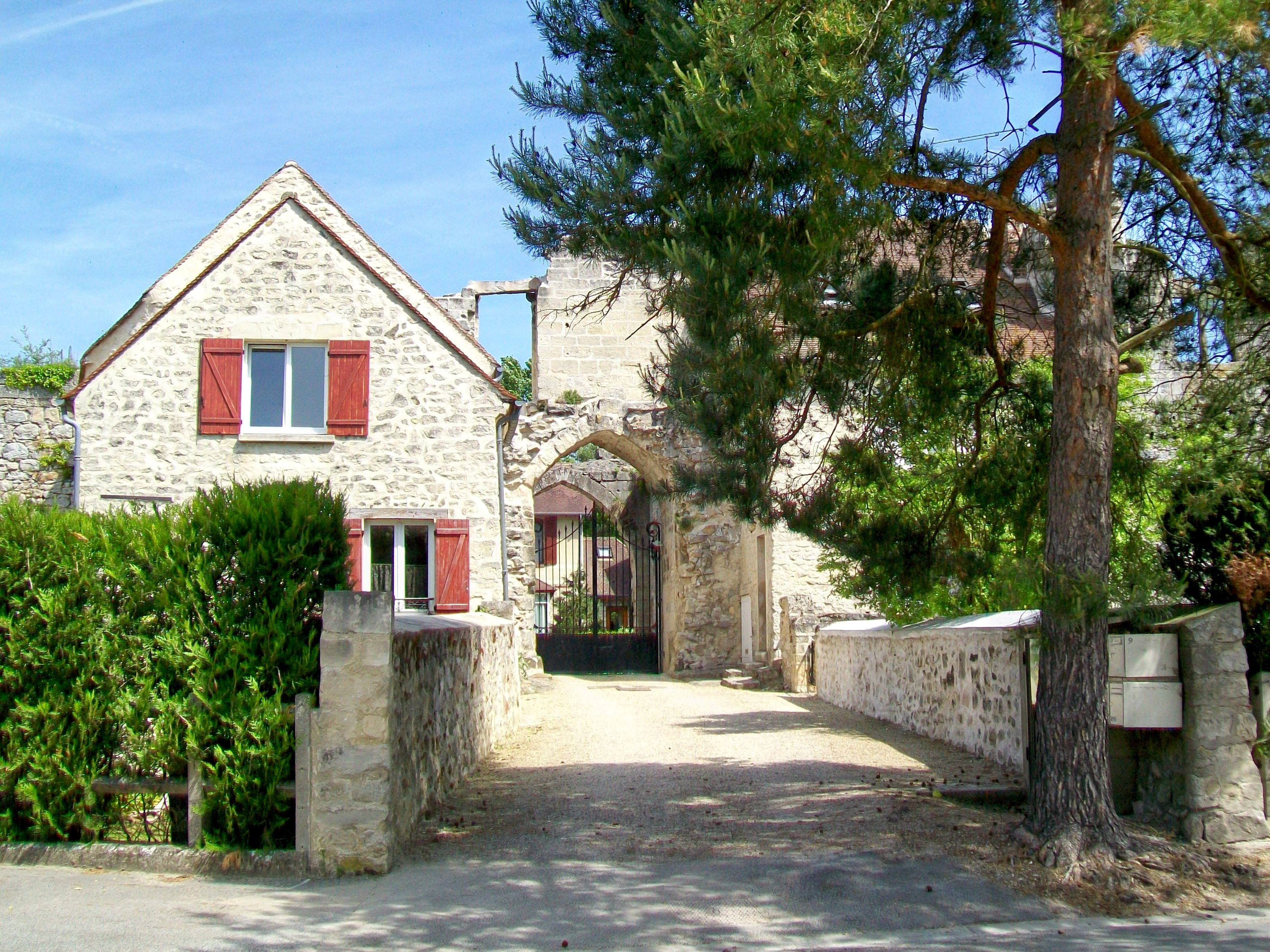 L'entrée à la cour de l'ancien château, qui est classé Monuments historiques depuis 1862. A droite subsiste une tour, cachée par le pin (visible sur l'une des autres photos). Les bâtiments à l'intérieur de la cour sont des maisons d'habitation ordinaires, des XIXe et XXe siècles.